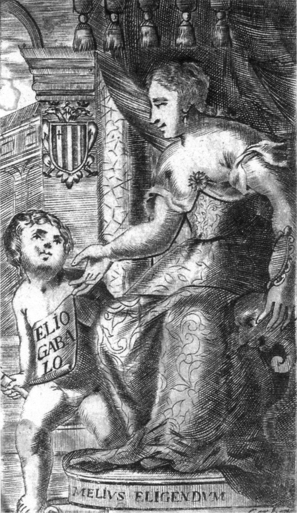 Aurelio Aureli, Giovanni Antonio Boretti - Eliogabalo - picture from the libretto - Venice 1668